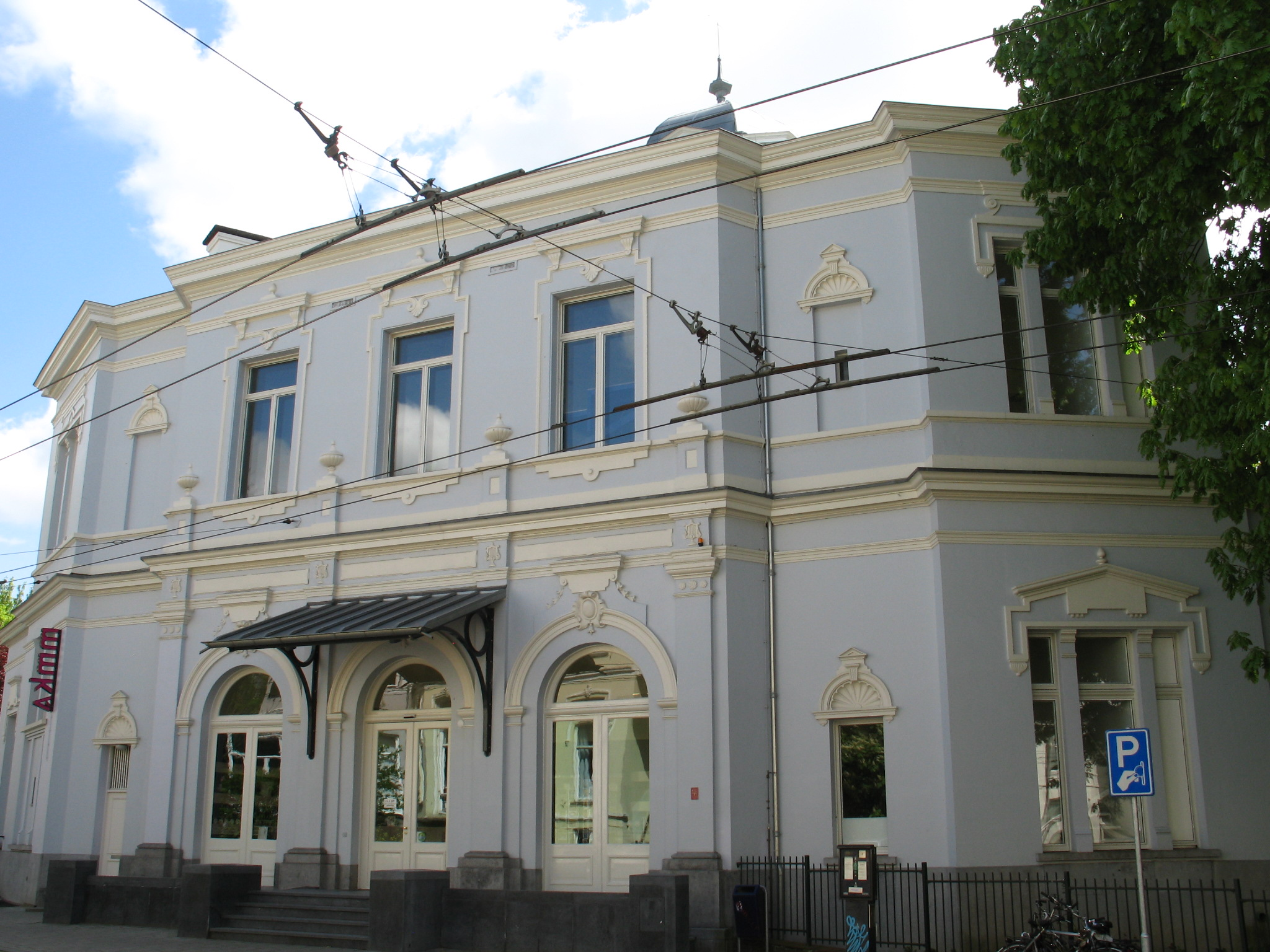 Gemeentemuseum